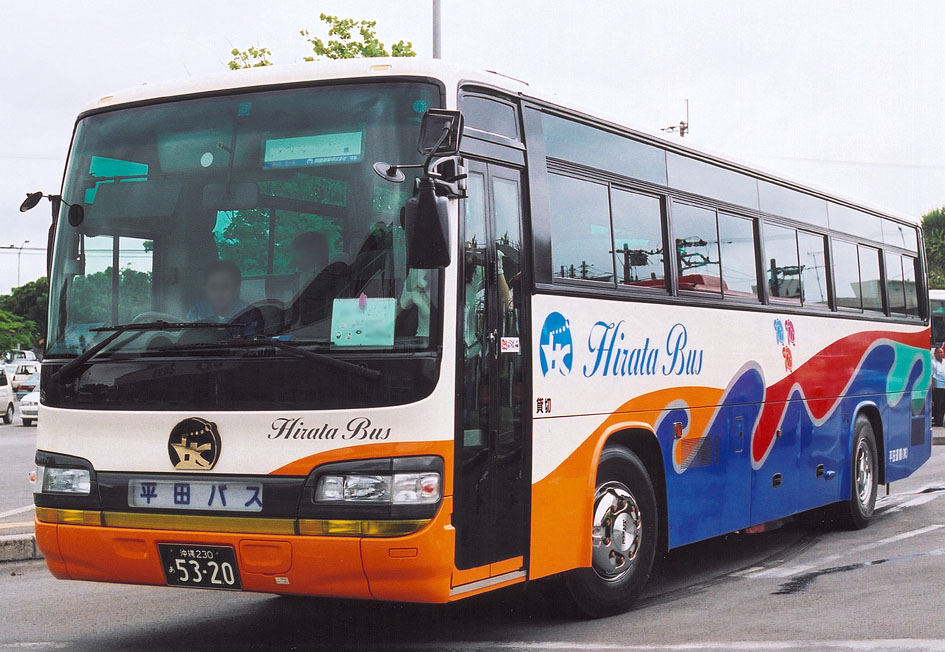 平田運輸 日野セレガR FS 11.5m KL-RU4FPEA